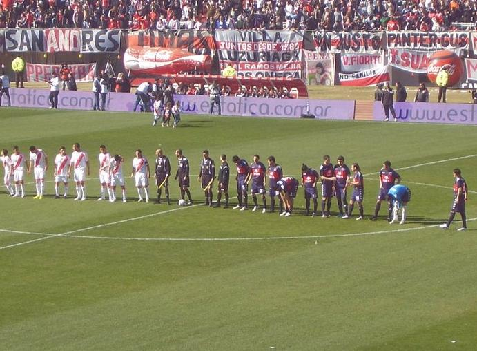 Equipos de River Plate y de Tigre, momentos antes del partido entre ambos por la 1º fecha del Torneo Apertura 2010